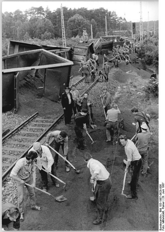 ADN-ZB Mittelstädt-28.6.1987-pra-Bez. Potsdam: Güterwagen entgleisten-Auf der Strecke Berlin-Rostock entgleisten bei der Fahrt durch den Bahnhof Dannenwalde, Kreis Gransee, 20 Wagen eines mit Erz beladenen Güterzuges. 16 Waggons davon stürzten um und beschädigten Bahnanlagen auf etwa 500 Meter Länge. Personen wurden nicht verletzt. Eisenbahner, unterstützt von Angehörigen der Zivilverteidigung und der Nationalen Volksarmee, sind mit schwerer Technik im Einsatz, um Waggons und Ladung wegzuräumen und die Bahnanlagen wieder instand zu setzen. Als Ursache für die Entgleisung wurde der Bruch eines Achsschenkels an einem der Güterwagen festgestellt.